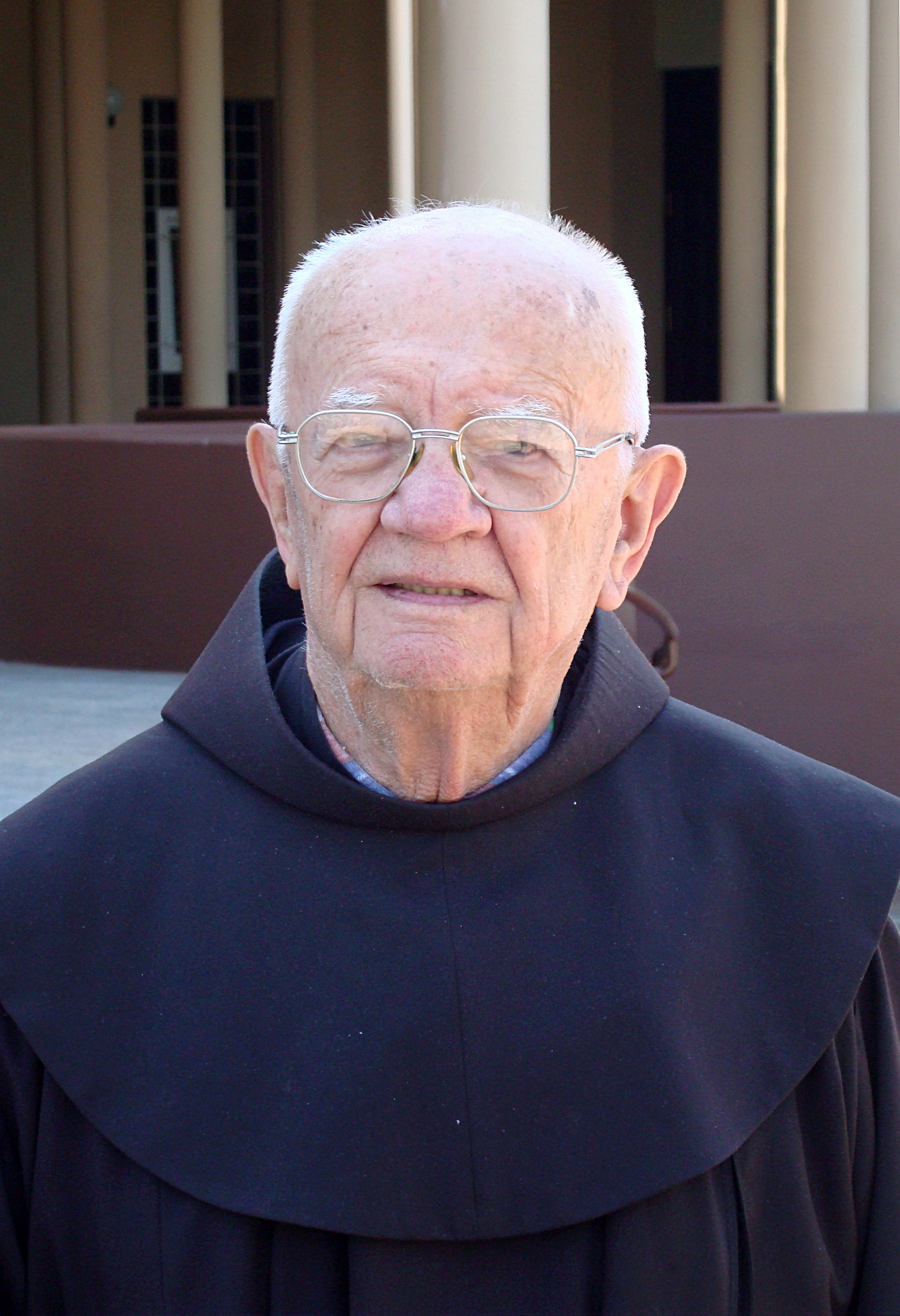 Bazilije Stjepan Pandžić --- Zagreb --- 2011-06-24